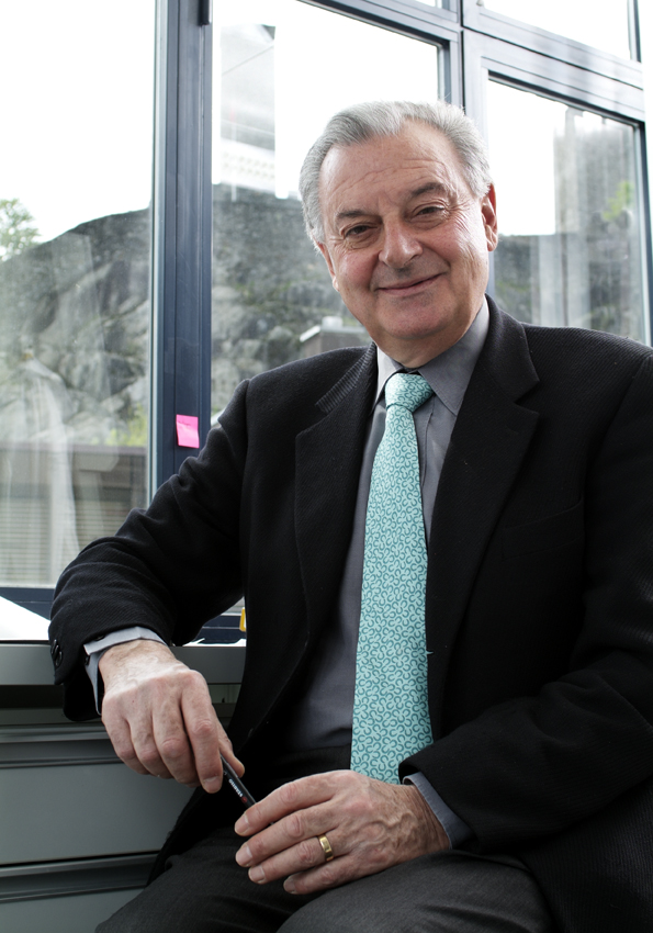 Giorgio Noseda è professore titolare emerito dell’università di Berna.